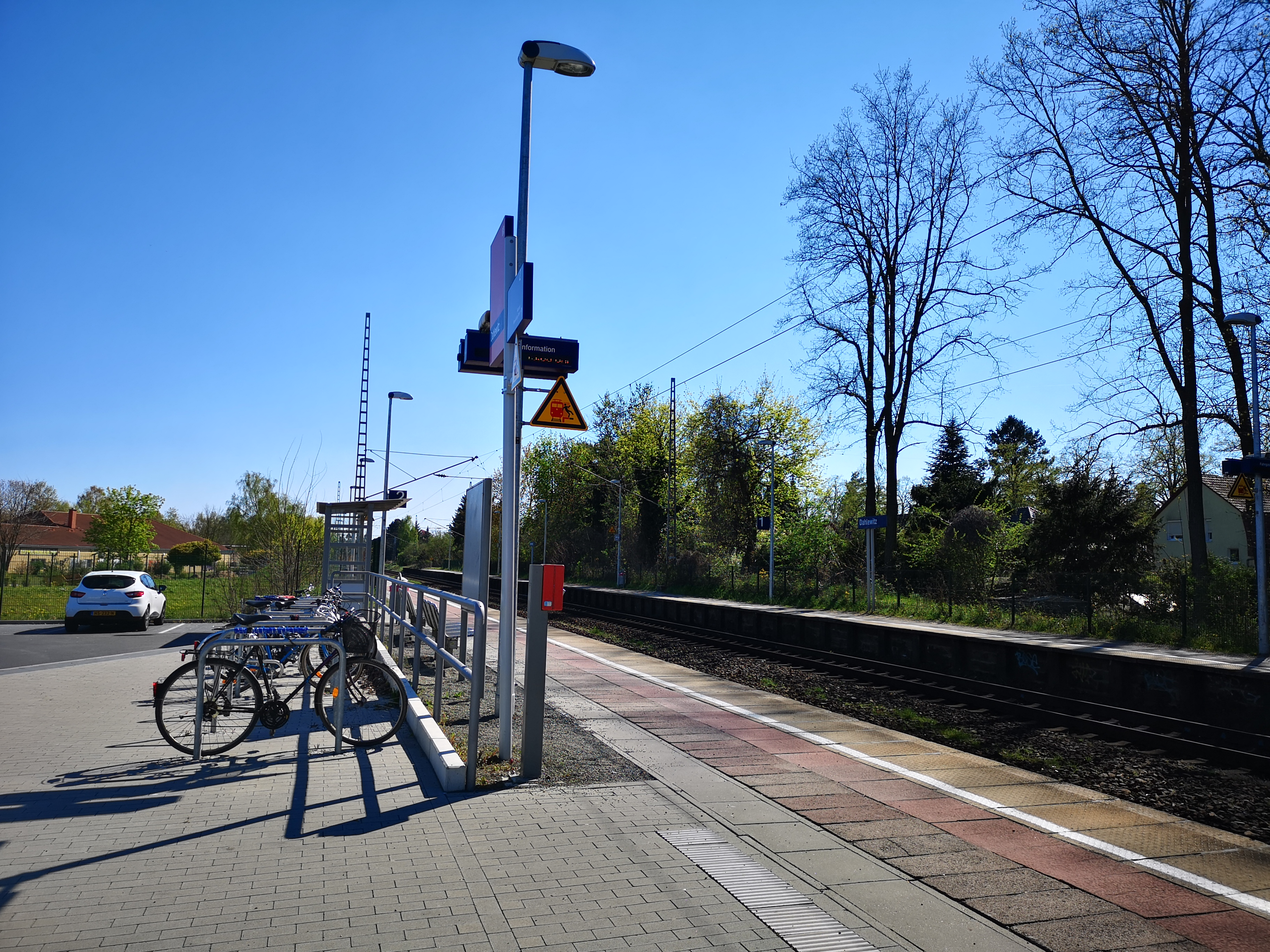 Station Der Deutschen Bahn